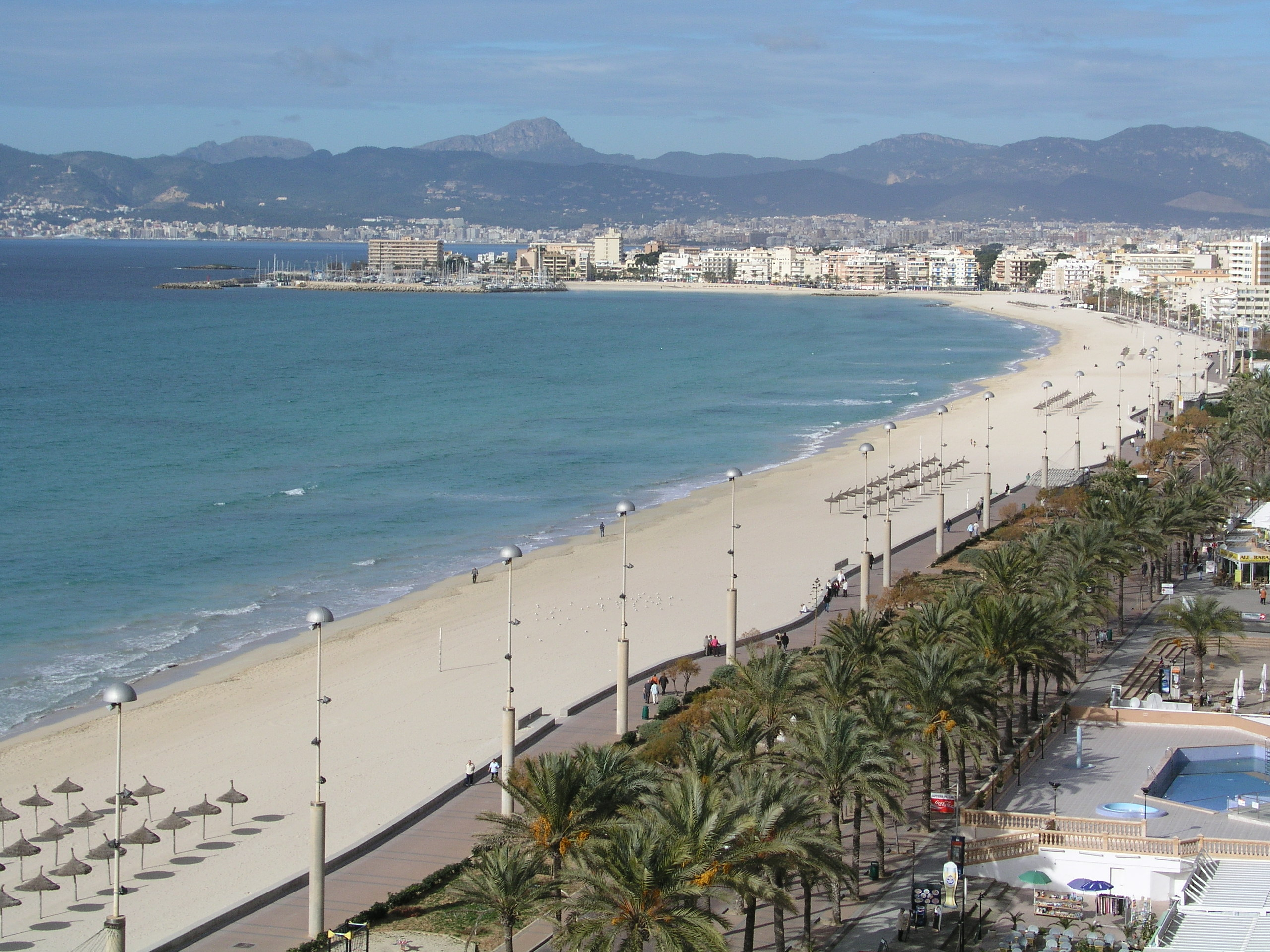 Platja de Palma im Winter, mit Blick auf Can Pastilla vom Dach des Hotels Gran Fiesta